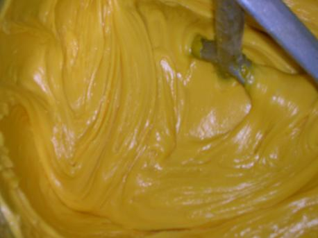 bignè